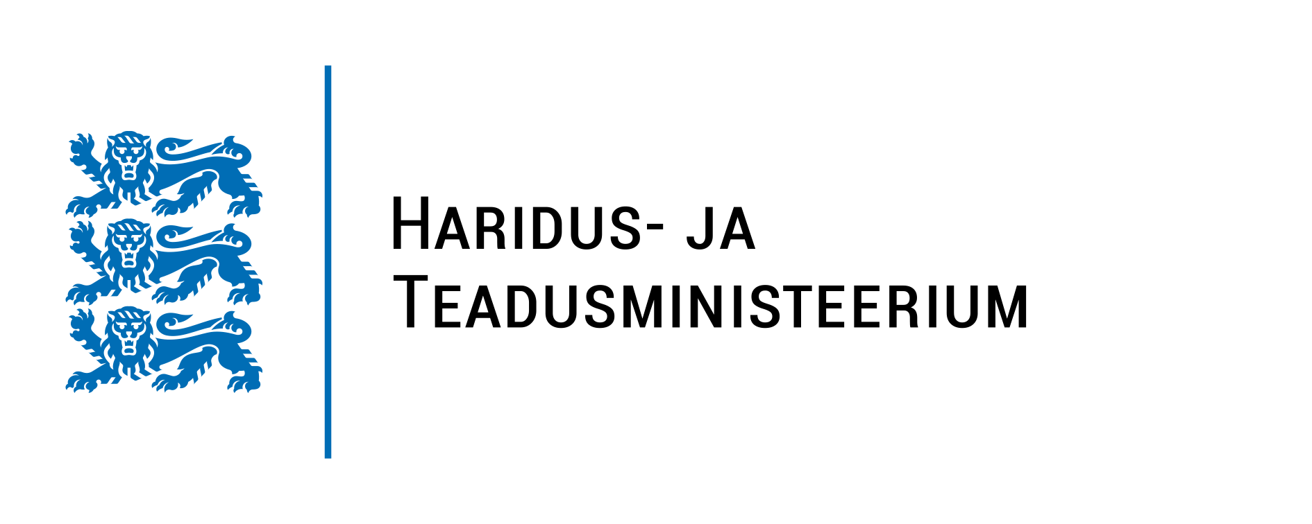 Haridus- ja Teadusministeeriumi logo